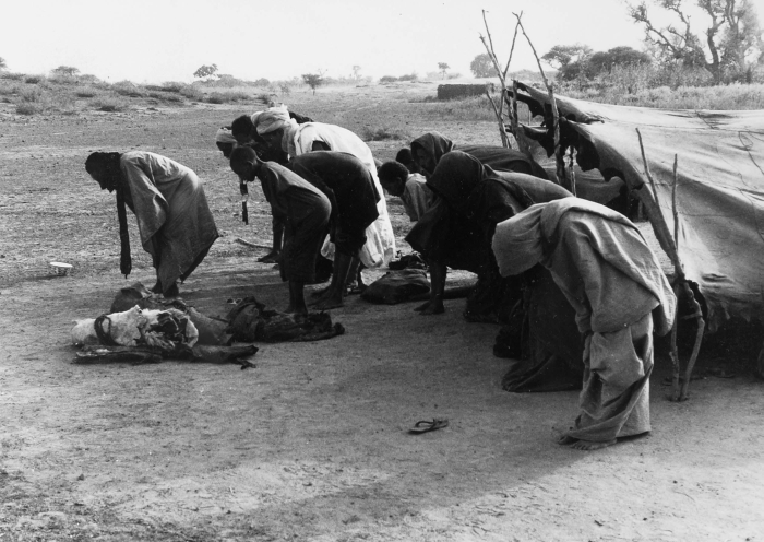 Het rituele gebed binnen de Islam wordt salat genoemd. Het zonsondergang of avondgebed, de maghrib, is het vierde gebed van de dag. In totaal zijn Moslims verplicht vijf dagelijkse gebeden te verrichten. De heer Broekhuijse heeft het gehele gebed op foto vastgelegd, de juiste volgorde waarop de foto's bezien moeten worden is: 20010324, 20010323, 20010321, 20010320 en 20010322.